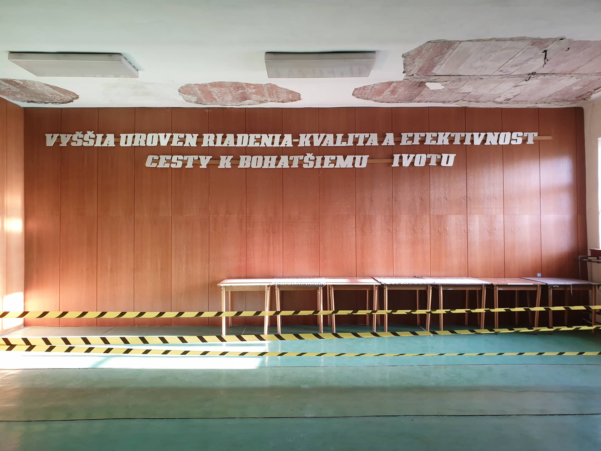 Modra´s orphanage - The Conference Hall